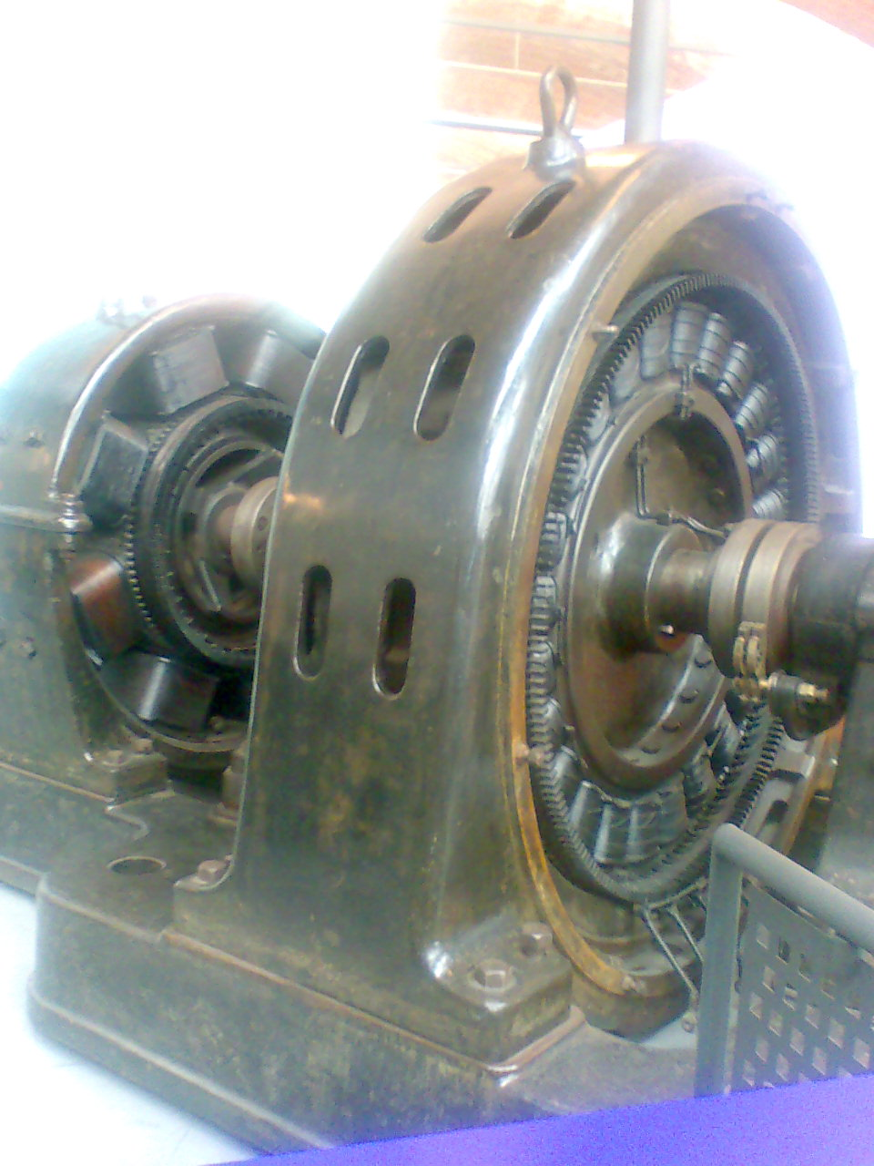 Alternador de fábrica textil. Museo de la Técnica de Terrassa